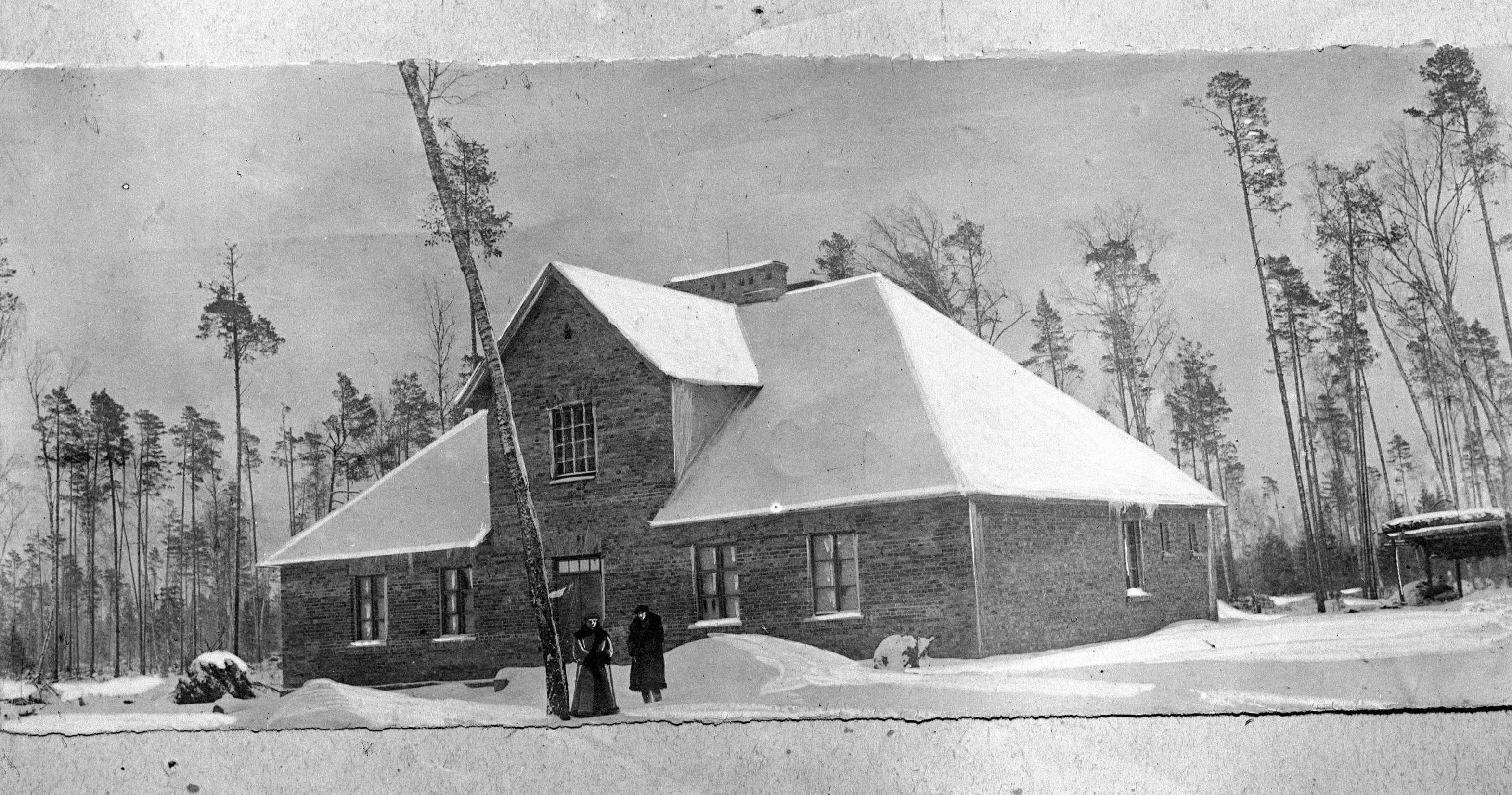 Strażnica batalionu Korpusu Ochrony Pogranicza w Samochwałkach; zima 1929 r. Koncern Ilustrowany Kurier Codzienny - Archiwum Ilustracji. Sygnatura: 1-W-1770.